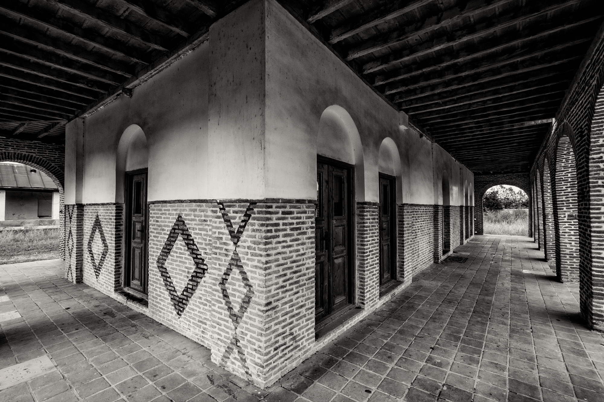 مقبره ملا محمد شهرآشوب